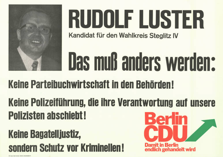 Rudolf Luster Kandidat für den Wahlkreis Steglitz IV Das muß anders werden: Keine Parteibuchwirtschaft in den Behörden! Keine Polizeiführung, die ihre Verantwortung auf unsere Polizisten abschiebt! Keine Bagatelljustiz, sondern Schutz vor Kriminellen! Berlin CDU Damit in Berlin endlich gehandelt wird Abbildung: Porträtfoto Plakatart: Kandidaten-/Personenplakat mit Porträt Drucker_Druckart_Druckort: 1971 Druck: Albert Hentrich, Berlin-Steglitz Objekt-Signatur: 10-004 : 385 Bestand: Plakate zu Abgeordnetenhauswahlen Berlin (10-004) GliederungBestand10-18: Plakate zu Abgeordnetenhauswahlen Berlin (10-004) » CDU Lizenz: KAS/ACDP 10-004 : 385 CC-BY-SA 3.0 DE